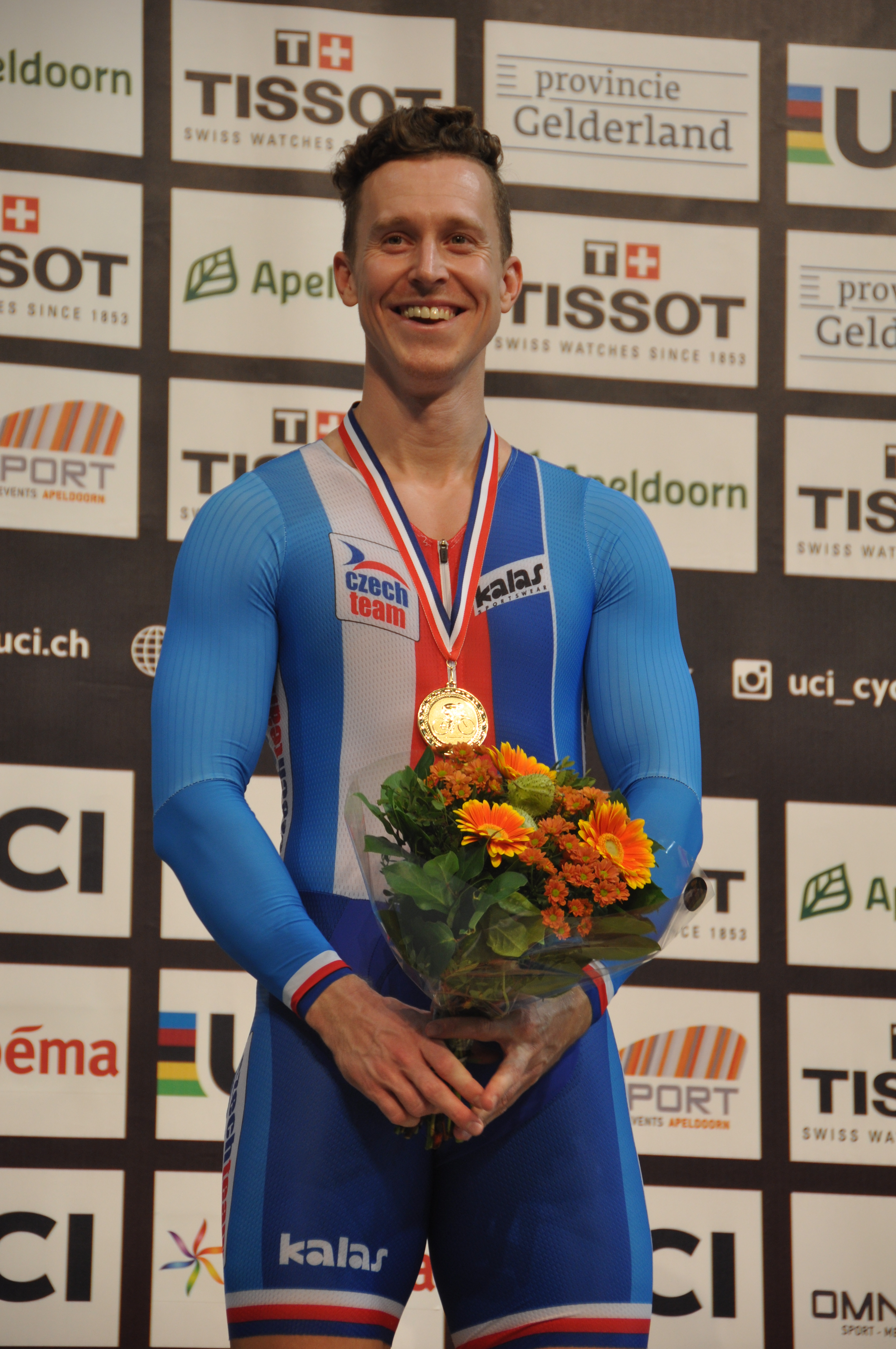 Tomas Babek, tschechischer Radsportler, Gold im Keirin